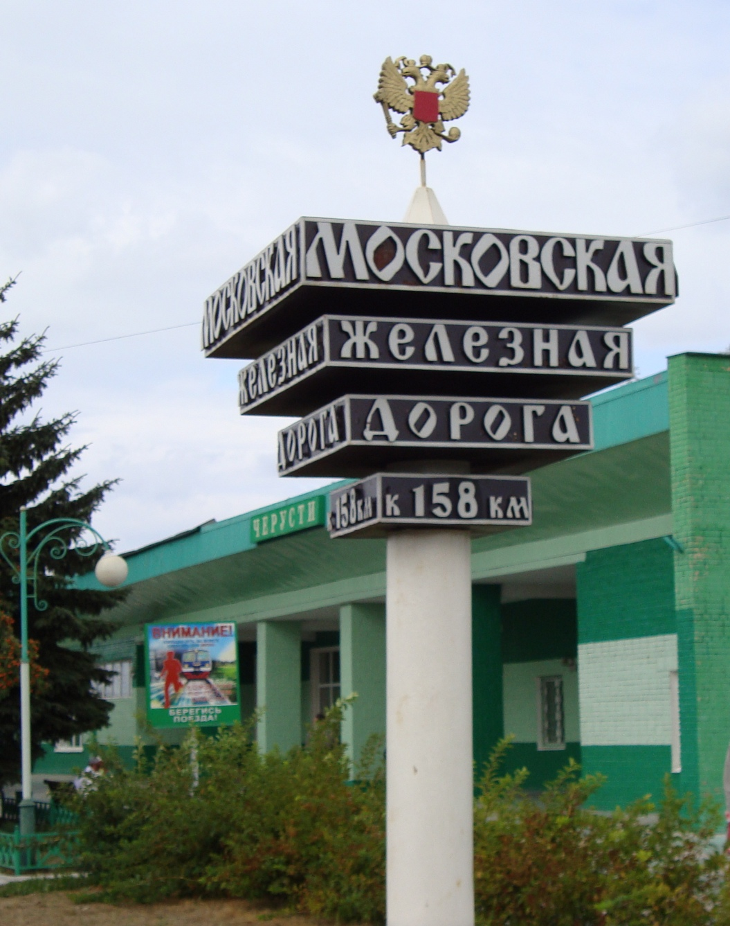 Километровый столб-памятник на стнации Черусти